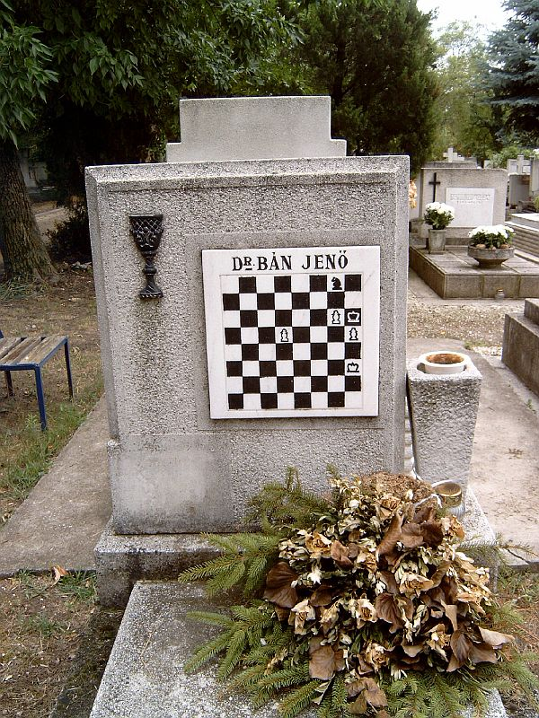 Bán Jenő (1919–1979) sakkmester, sakkfeladványszerző- és sakkoktató mester sírja Budapesten. Új köztemető: 63/9-1-48